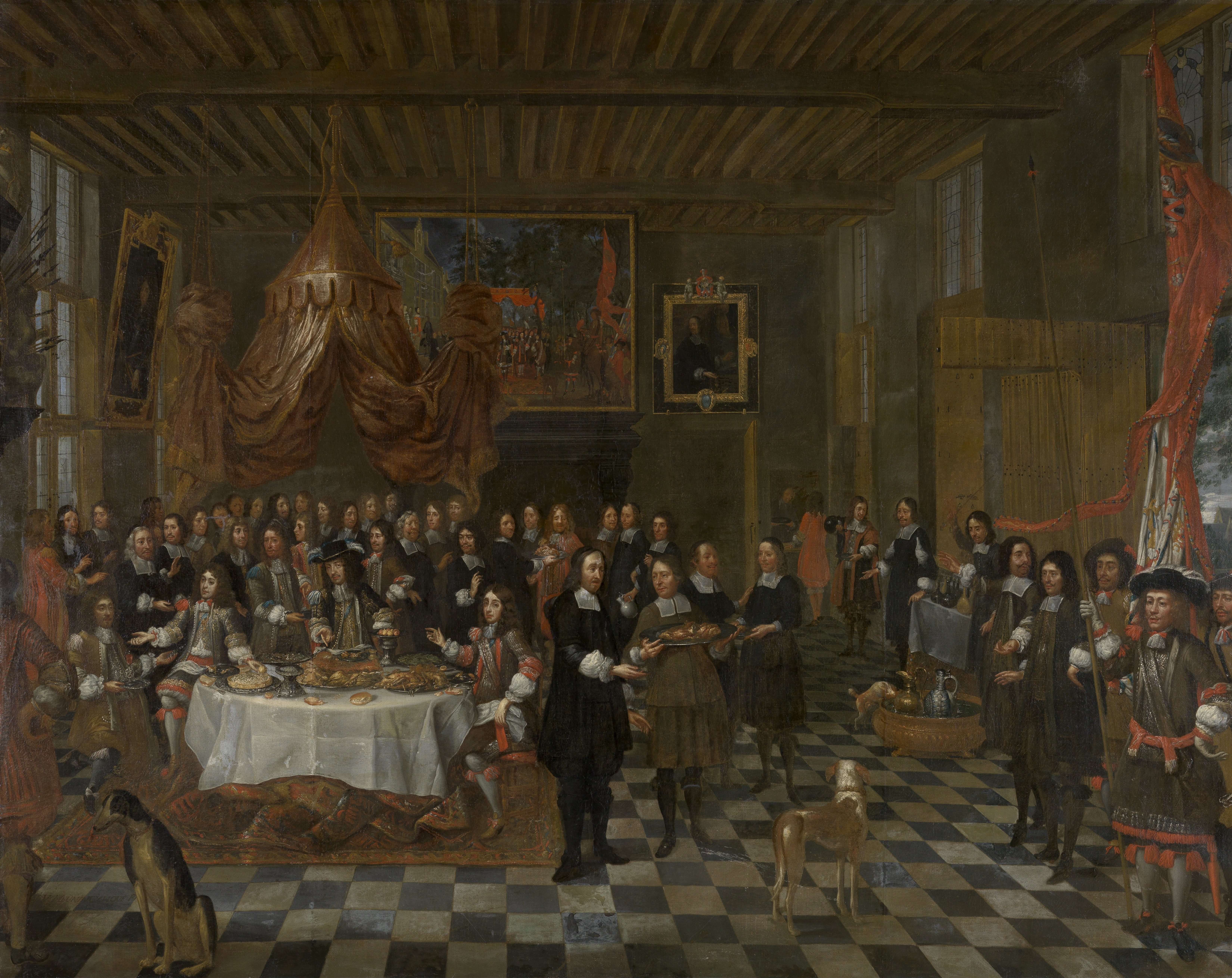 Dit schilderij toont het feestmaal dat op 2 oktober 1656 door de Brugse Sint-Barbaragilde, de gilde van de busschieters of kolveniers, werd aangeboden aan de Engelse koning Charles II en zijn broers Jacob Stuart, hertog van York, en Henry Stuart, hertog van Gloucester, ter gelegenheid van hun bezoek aan Brugge. De vorst en zijn beide broers waren net als nieuwe leden in de gilde opgenomen. Jacob Stuart was er bij die gelegenheid in geslaagd om de hoofdvogel, de 'papegay', af te schieten. Het banket is gesitueerd in het gildelokaal. Links zitten de koning en zijn broers samen aan een ronde tafel met allerlei gerechten. De gildehoofdman presenteert knielend de erewijn aan de hertog van York. Tussen beide laatste personages staat de bisschop van Brugge, Carolus van den Bosch. Achter de tafel staat het volledige gildekorps en tal van tafeldienaren en erewachten. Tegen de achterwand bemerkt men, als anachronistisch curiosum, de geschilderde voorstelling van de ontvangst van Charles II in de Schuttershof, het in 1671 gedateerde pendant van dit schilderij. Aan weerszijden van dit grote schilderij hangen de portretten van Henry en Jacob Stuart; beide werken zijn verloren. (Naar: H. Vlieghe, Stedelijke Musea Brugge. Catalogus Schilderijen 17de en 18de eeuw, Brugge, 1994, pp. 186-187.)